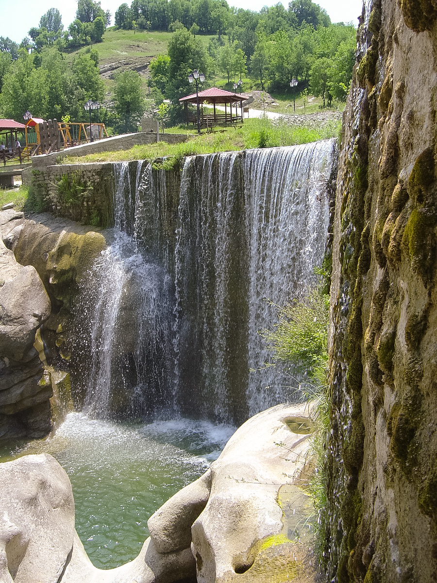 Η Δέση στον νερόμυλο